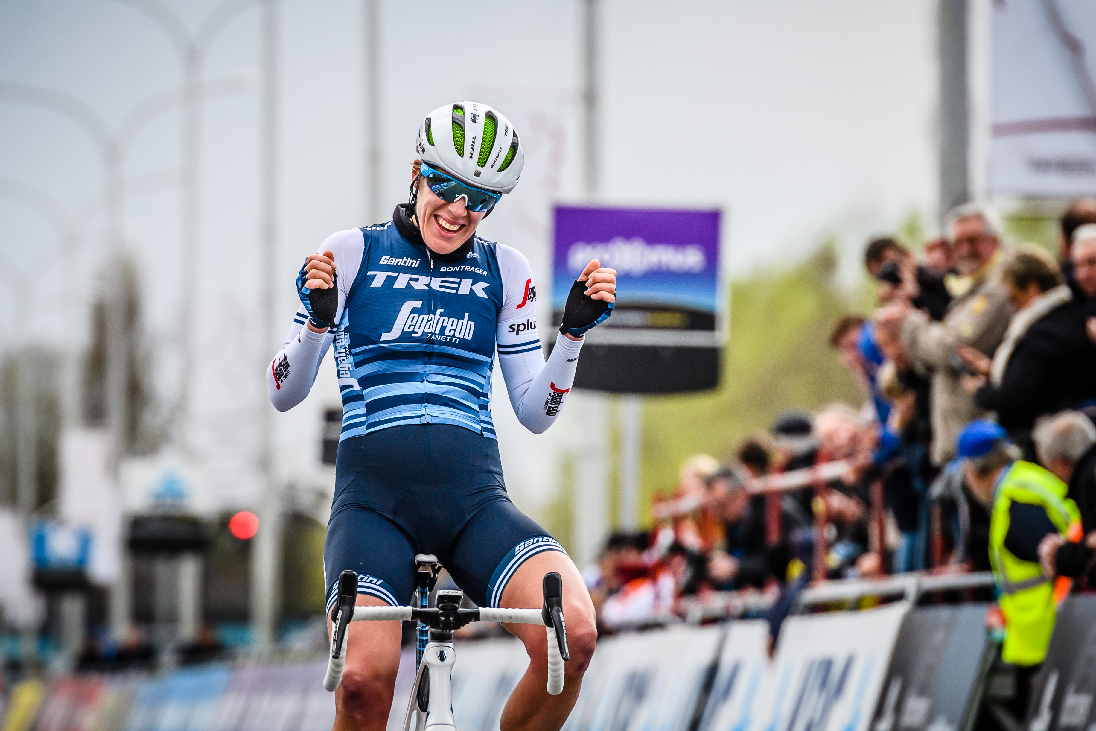 In 2019 telt Dwars door Vlaanderen voor vrouwen - intussen ingeschaald als een 1.1-koers - met Kluisberg, de Knokteberg, de Hotond, het Vossenhol, de Holstraat en Nokereberg zes gereputeerde kuitenbijters. Met Ellen Van Dijk (foto) - ook al de beste in 2018 - wint opnieuw een Nederlandse in Waregem. Door een valpartij in het vrouwenpeleton op een plek waar korte tijd later ook het mannenpeleton zou passeren, moeten de mannen noodgedwongen even voet aan grond zetten. De ambulance en de wedstrijdwagen met de groene vlag versperren de doorgang en liggen aan de basis van een korte neutralisatie. Het levert opmerkelijke beelden op - koploper Lukas Pöstelberger raakt verzeild in de achtergrond en wordt door Sporza-man-op-de-motor Renaat Schotte terug naar voor gebracht - maar uiteindelijk kunnen beide pelotons hun weg vervolgen.